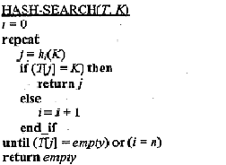 Hash search